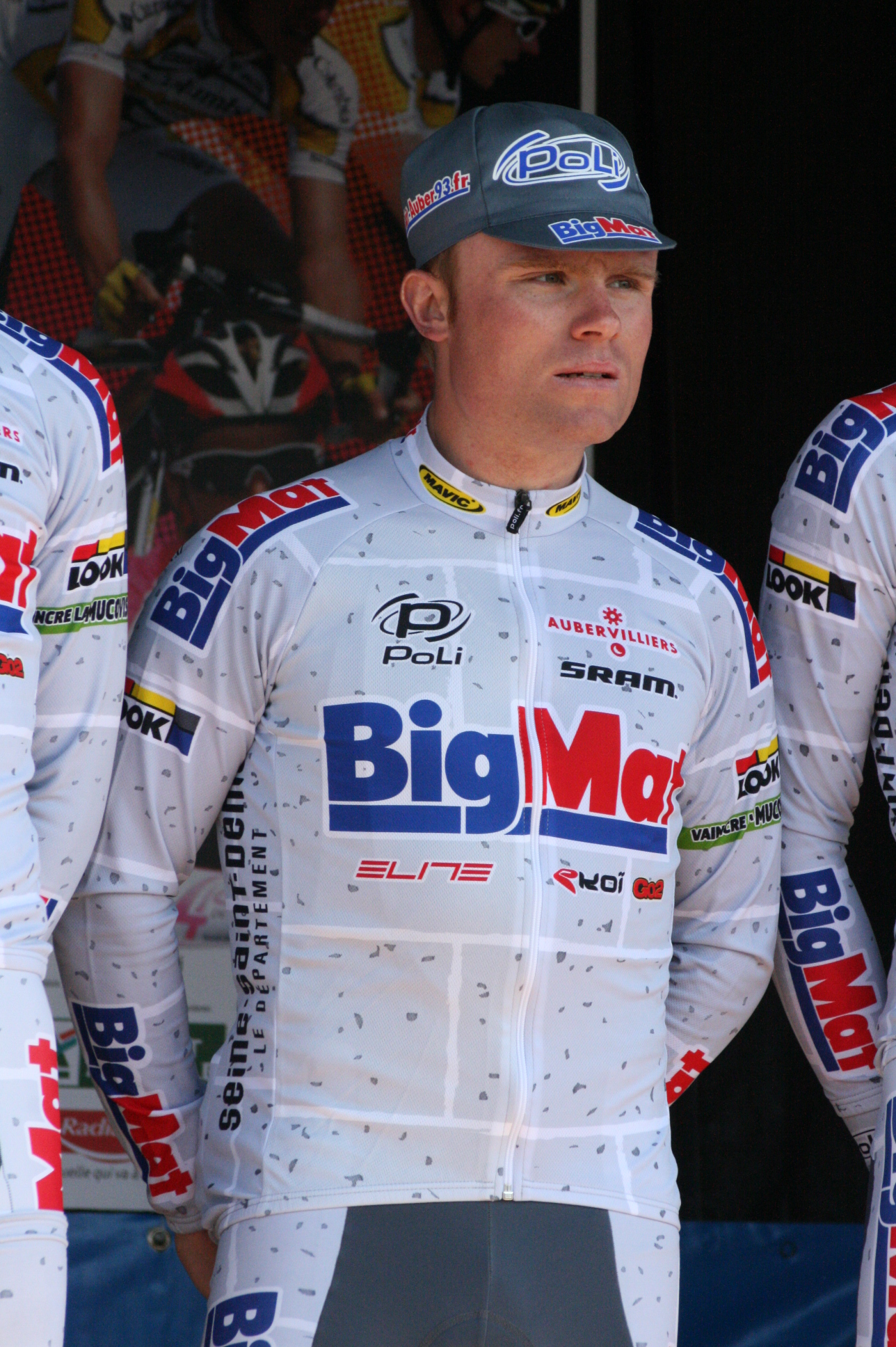 Fabien Bacquet, lors de la présentation des équipes des 4 jours de Dunkerque 2010